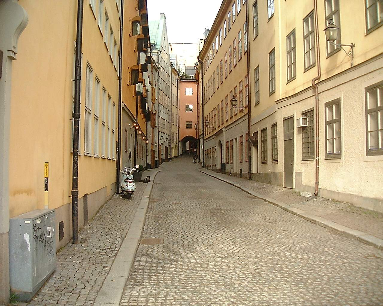 Bredgränd viewed from Skeppsbron.